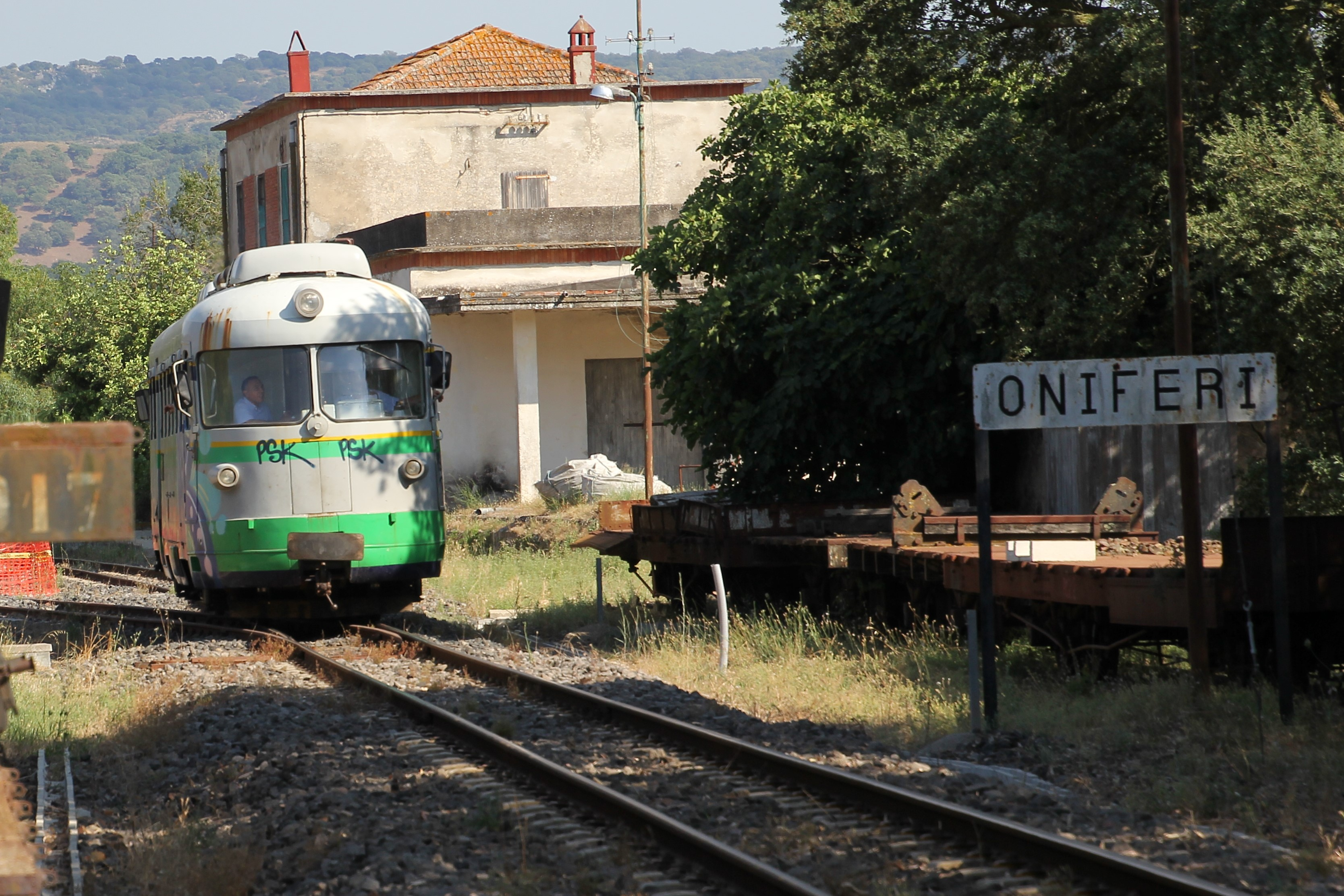 Oniferi, stazione ferroviaria